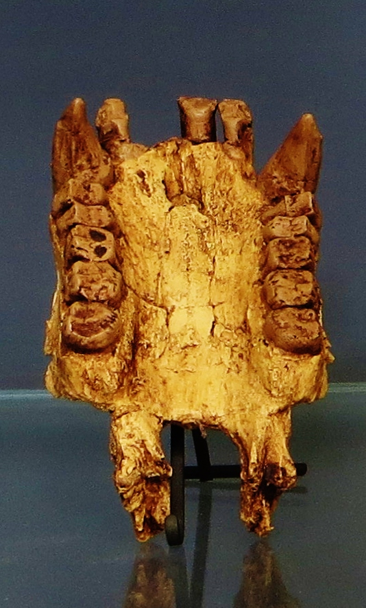 Fossil of Morotopithecus, an extinct mammal- Took the photo at Musee d'Histoire Naturelle, Paris